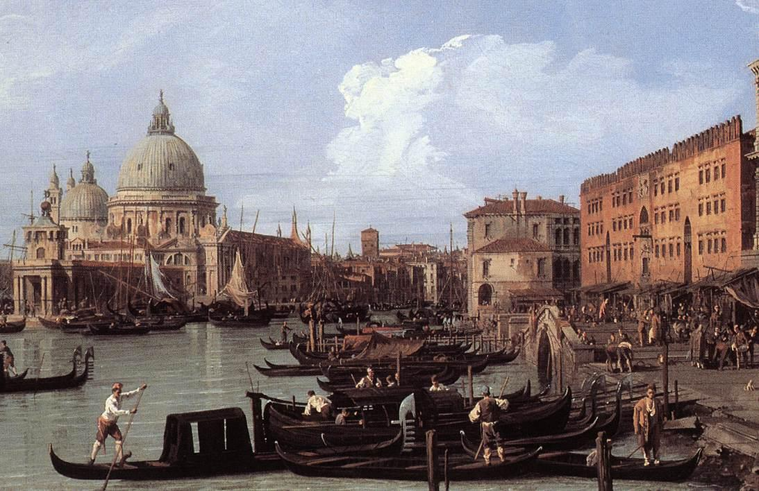 detail